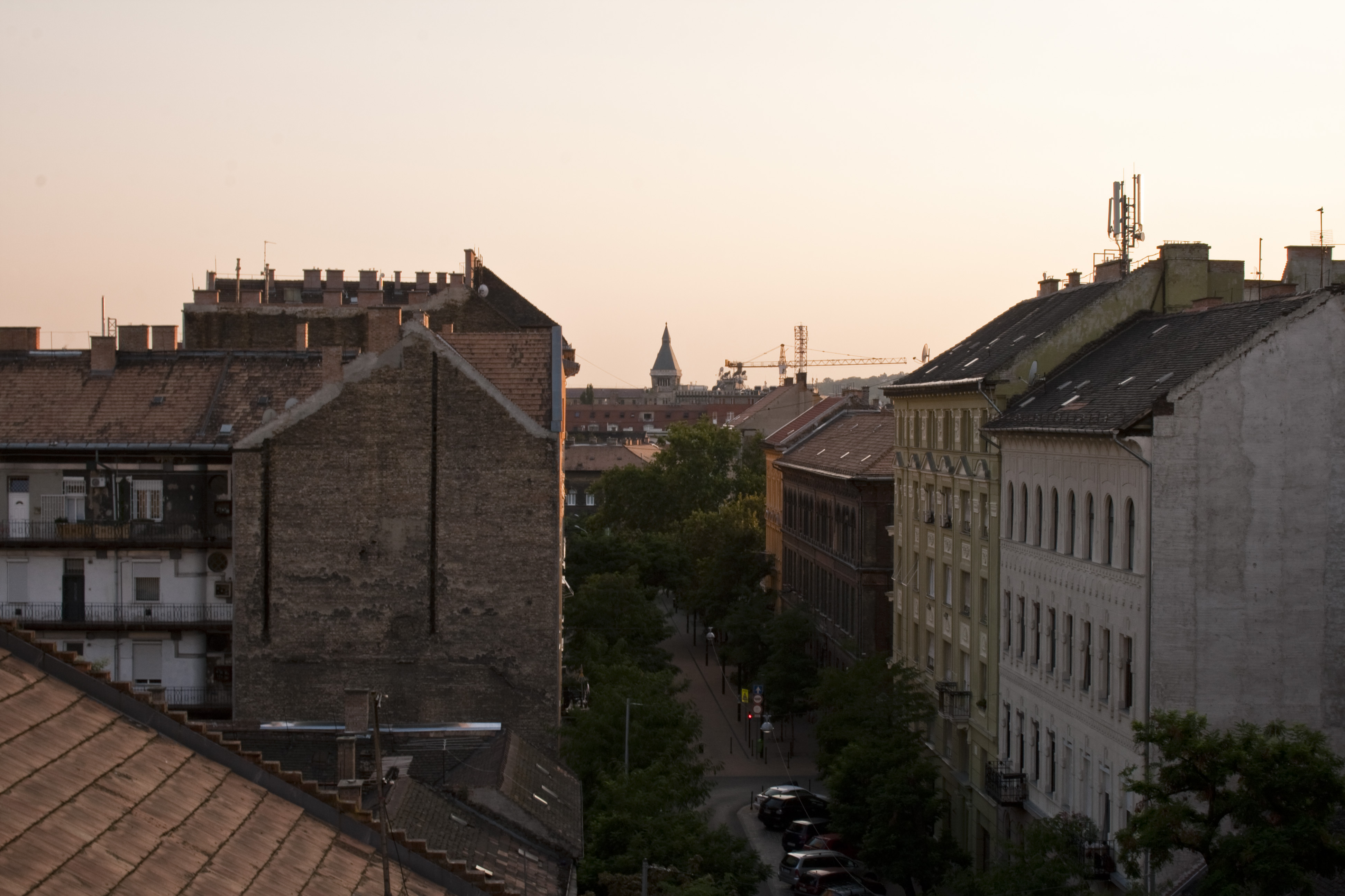 Rue Bauer Sándor, Magdolna quartier